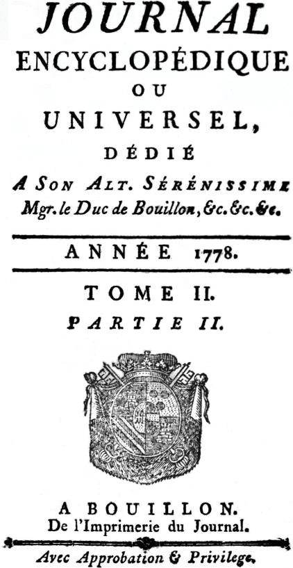 First page of original Journal Encyclopédique ou Universel by Pierre Rousseau (1716-1785).